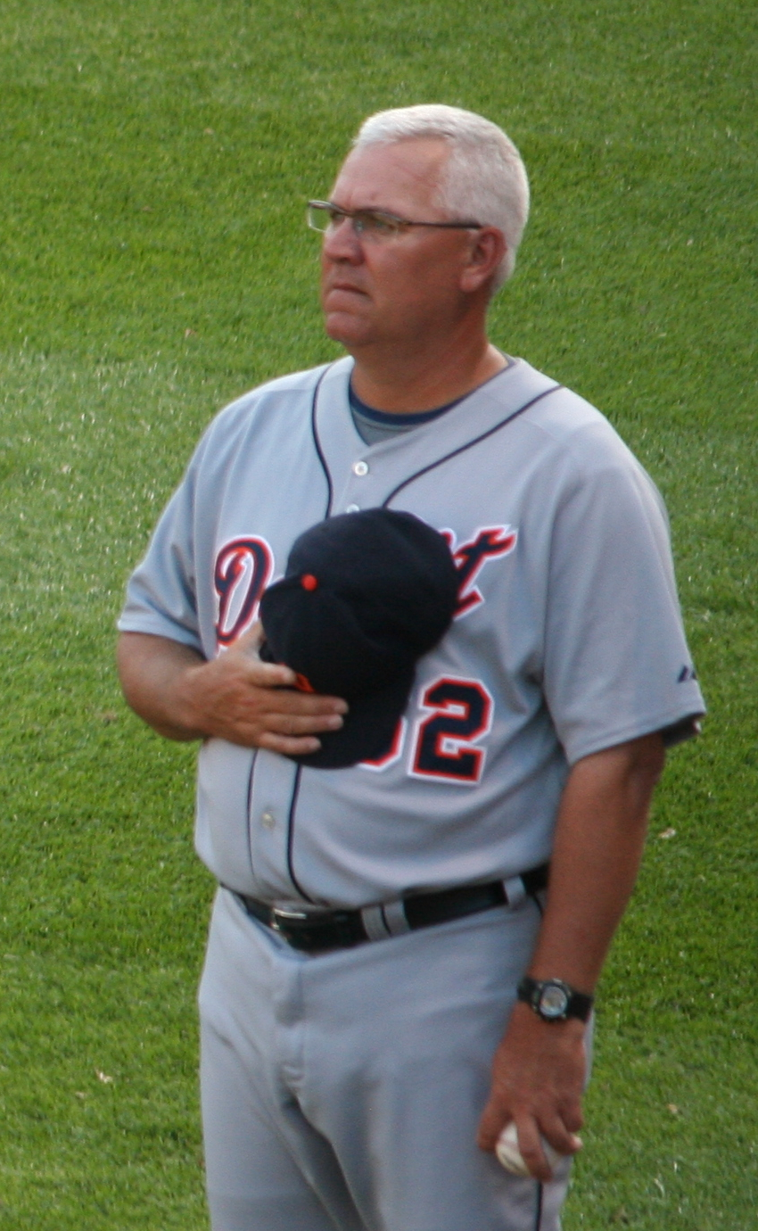 Rick Knapp